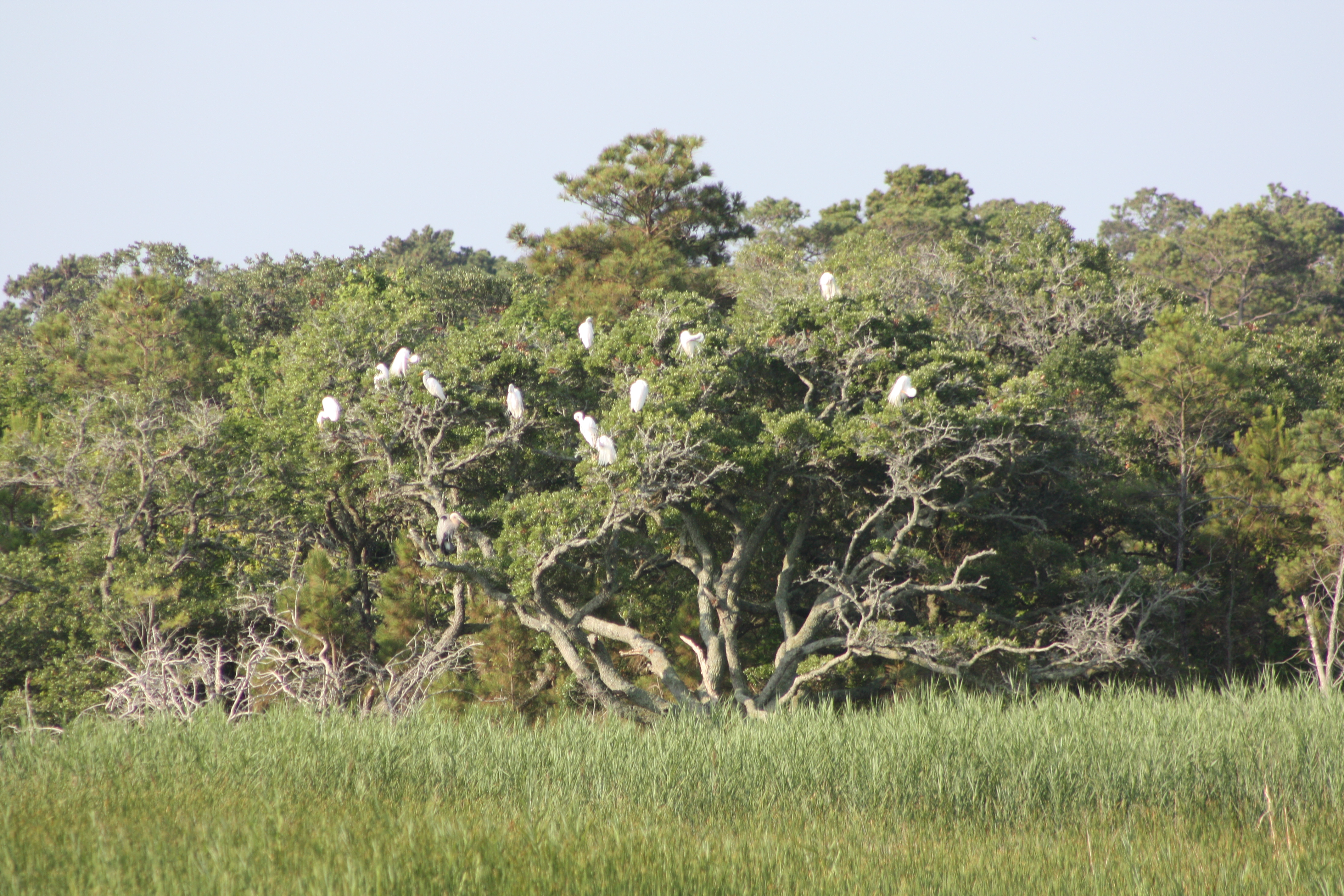 Cattle egrets